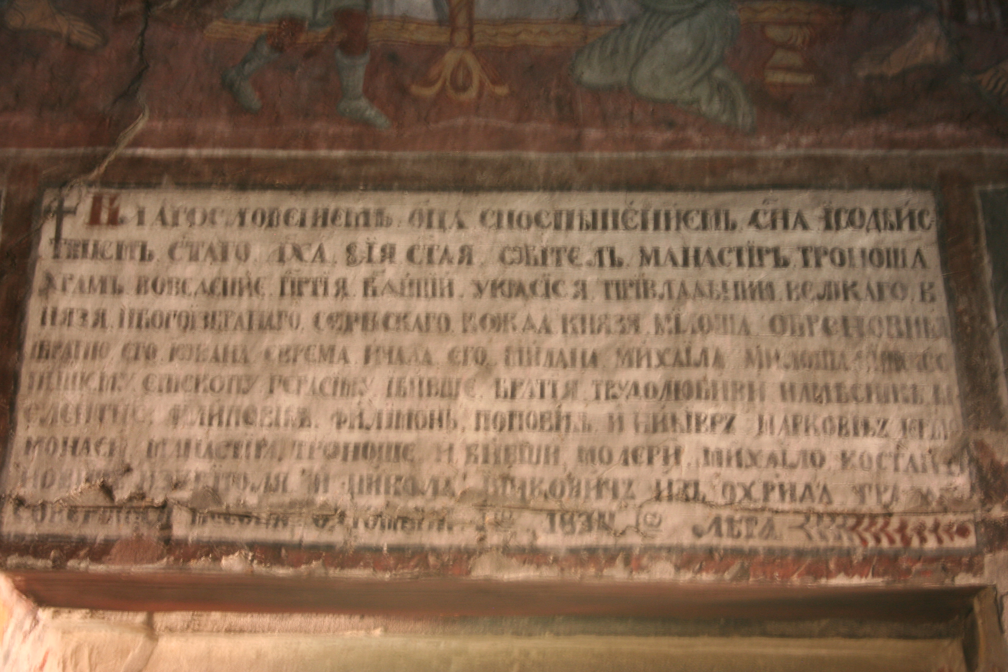 Manastir Tronoša